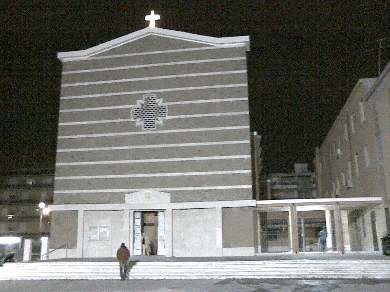 Torvaianica, frazione di Pomezia: vista notturna della chiesa parrocchiale della Beata Vergine Immacolata.